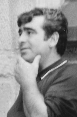 Marie-Claire Alain et Maurice André au Festival Bach de Saint-Donat en 1969